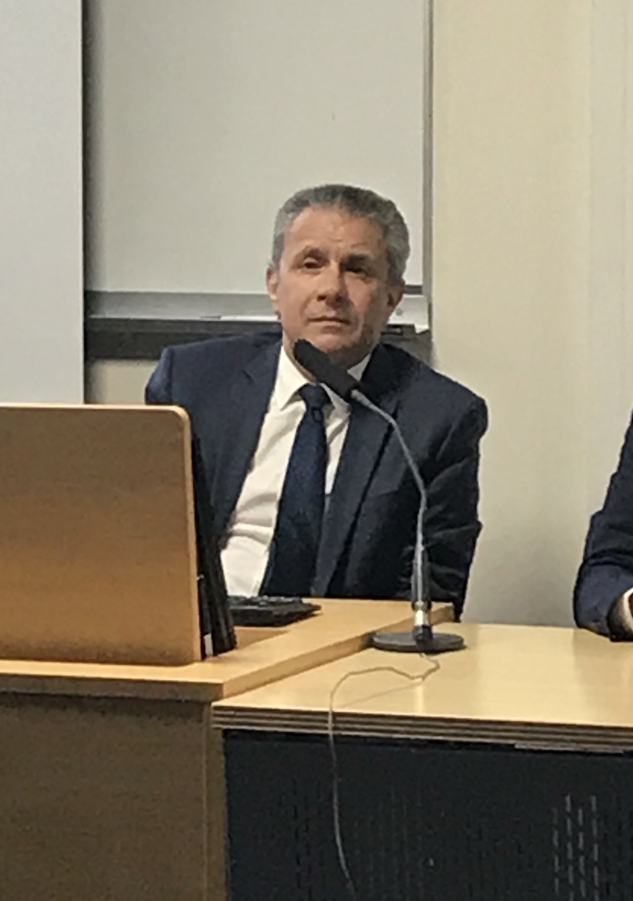 Abdelaziz Rassâa, ingénieur, diplomate et homme politique tunisien, en conférence à Sciences Po Paris, le 29 mars 2018.